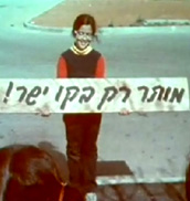 הדוברמן החברמן הייתה תוכנית טלוויזיה בת חמישה פרקים שנועד לחנך את הילדים לזהירות בדרכם